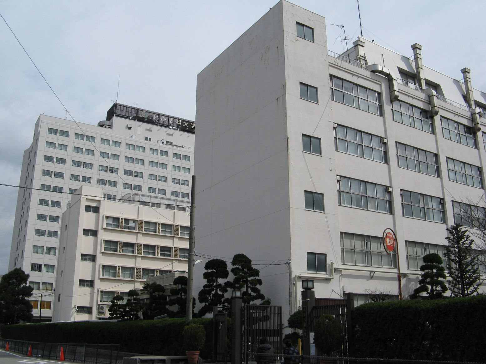 兵庫医科大学